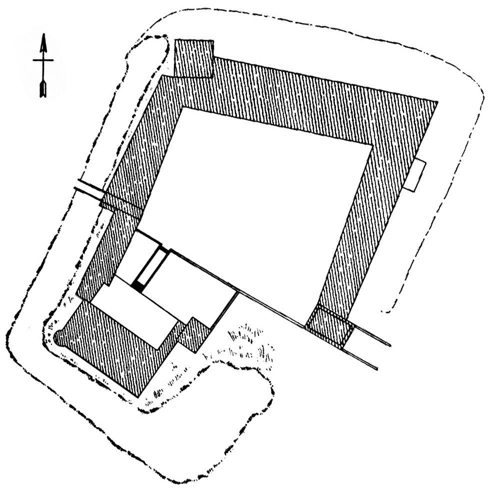 Lageplan der Burg Dürboslar